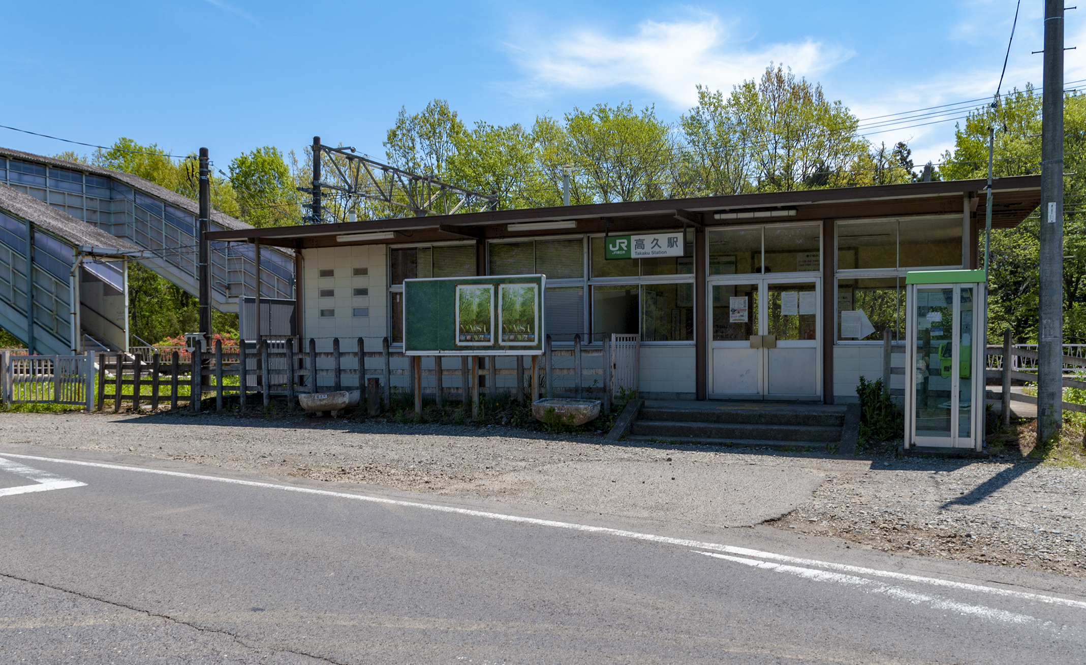 東日本旅客鉄道株式会社東北本線高久駅駅舎